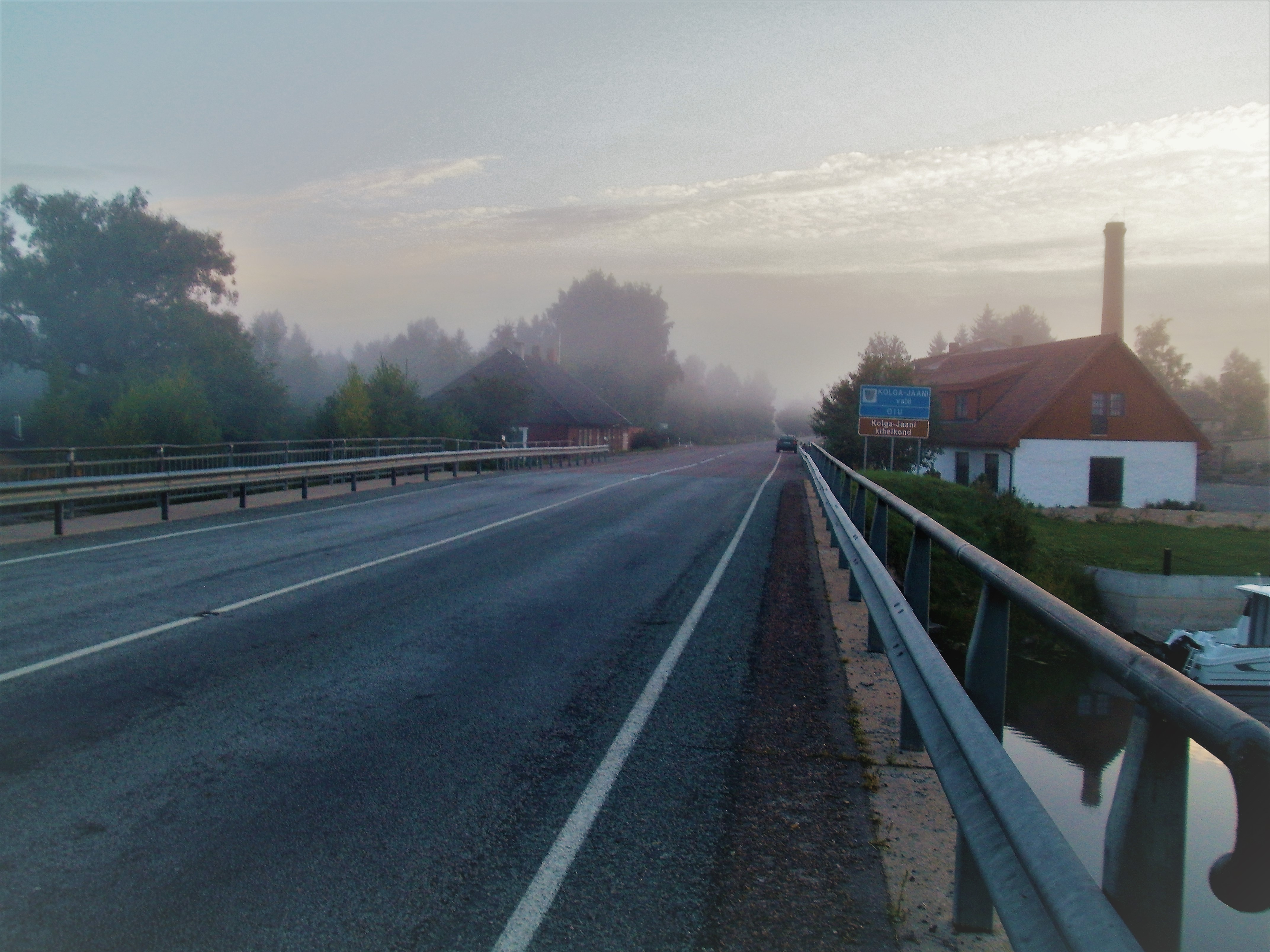 Tänassilma jõe sild Viljandi-Tartu maanteel. Vaade kirdesse Tartu suunas.